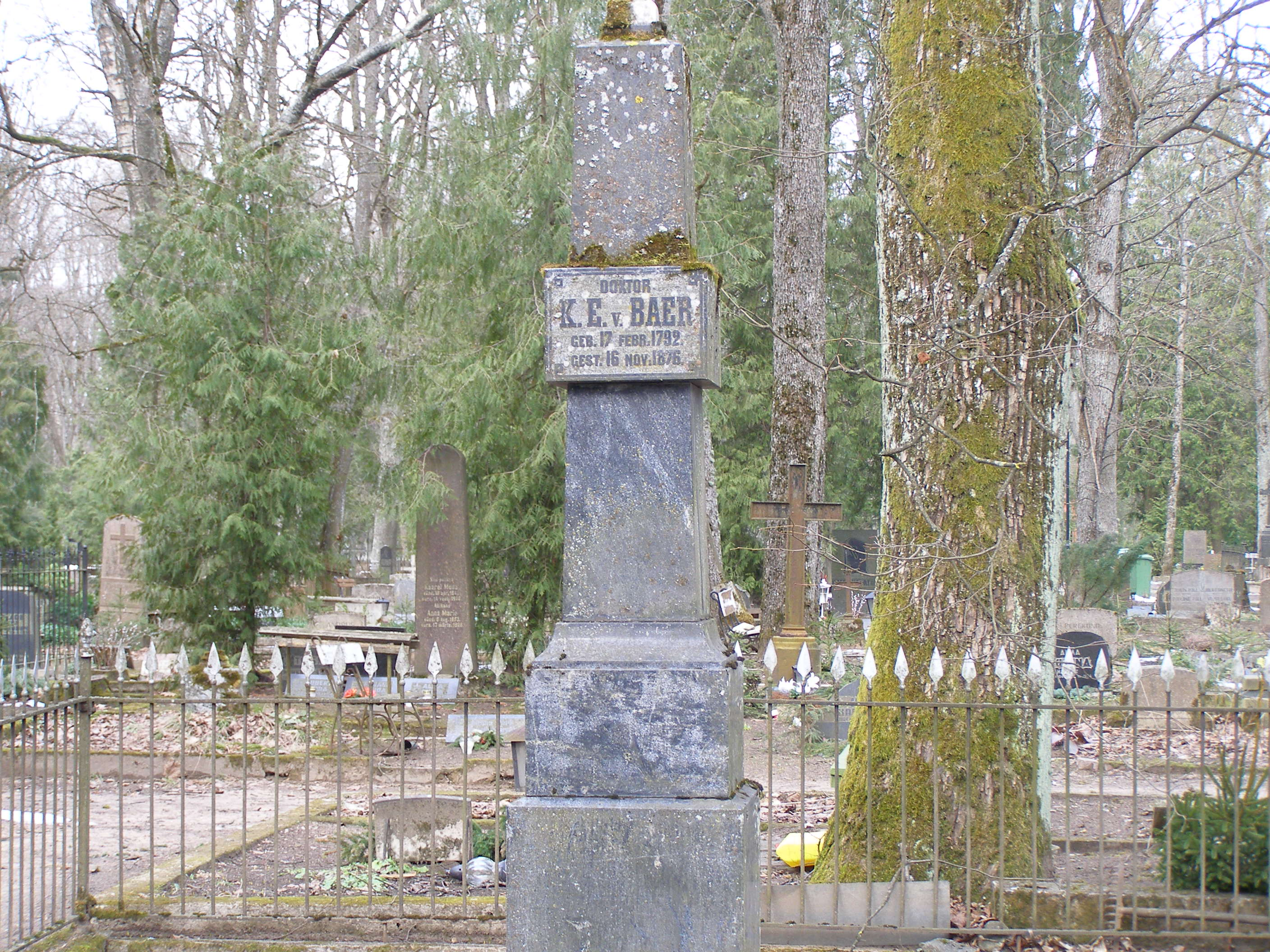 Karl Ernst von Baeri hauasammas Vana-Jaani kalmistul Tartus